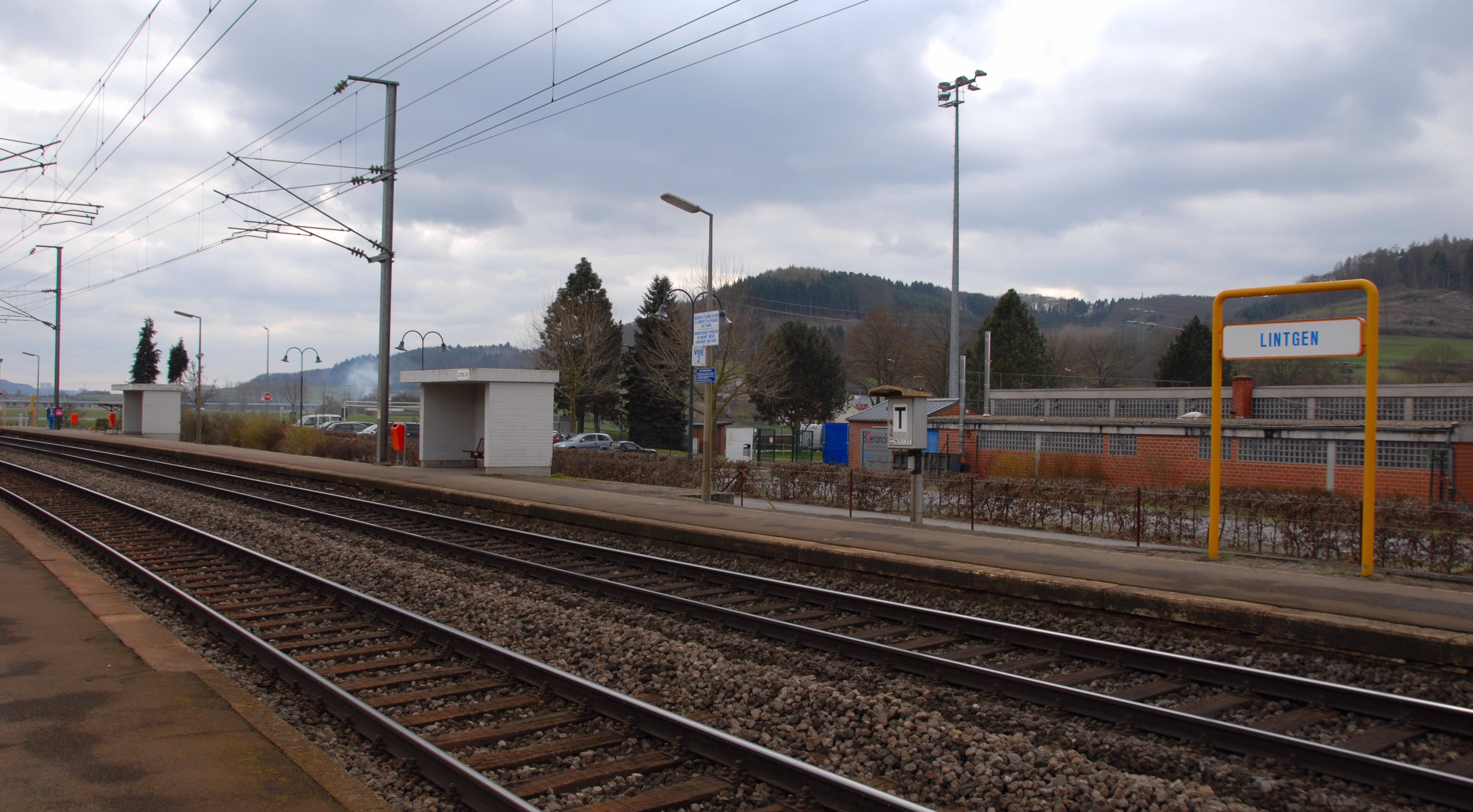 La gare de Lintgen (Luxembourg)